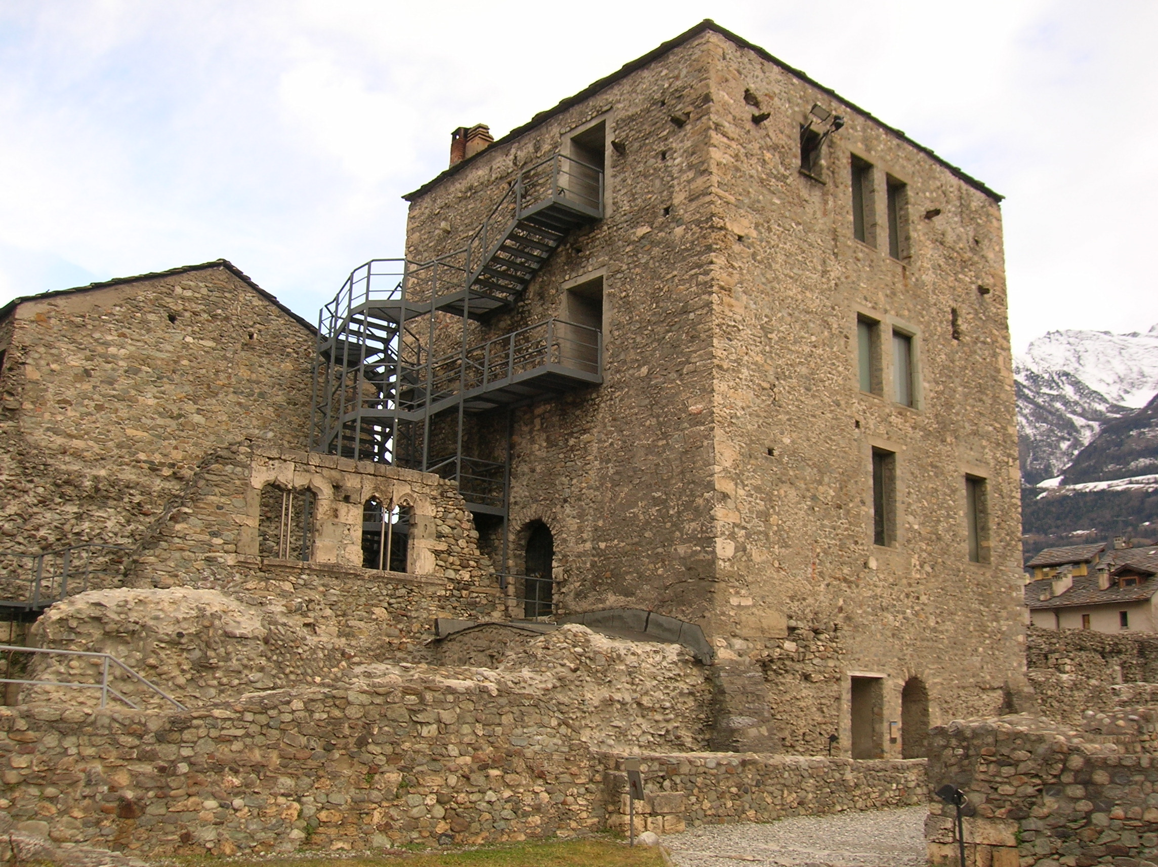 Tour formage, lato nord-ovest. La torre si trova nei pressi del Teatro rimano, ad Aosta, Valle d'Aosta, Italia.